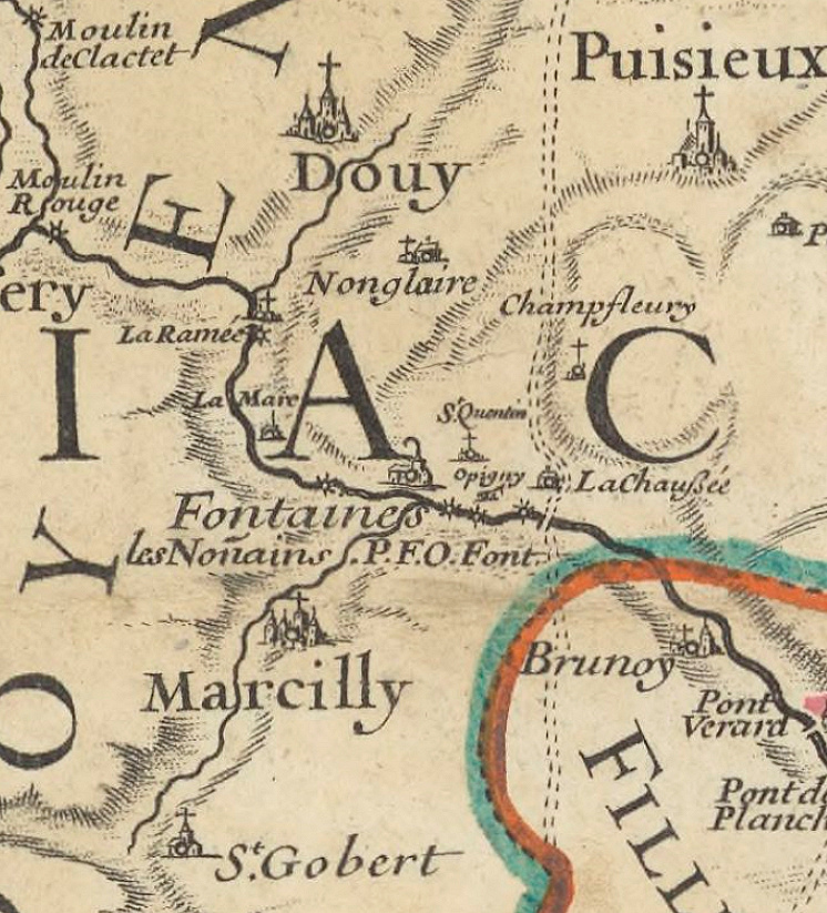 Localisation du prieuré de Fontaines-les-Nonnes.